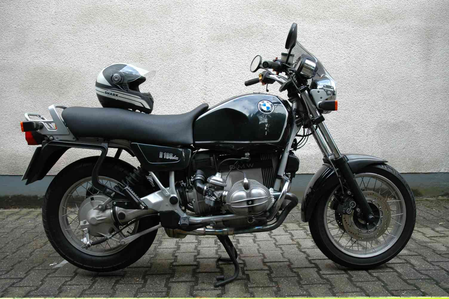 BMW R100R Die Bmw R100R ist der Nachfolger der berühmten Gummikuh. Aus dem 1000ccm Boxermotor kommen satte 44kw (60Ps) zum Vorschein. Die BMW R100R ist der letzte legendäre 2Ventil Boxer von BMW. Mit den 78Nm, die die BMW mit dem Kardanantrieb auf die Straße bringt, hat die R100R ein Vmax von ca.185km/h. Die Beschleunigungszeit liegt bei ca. 4,8sec. Von 0 – 100 km/h.Vorne hat BMW eine Telegabel von Showa eingebaut und fürs Hinterrad wurde eine Einarmschwinge verwendet. Das Leergewicht beträgt ca. 220kg. Die zweite Scheibenbremse vorne war nur teilweise serienmäßig bei der BMW R100R. Mit einem Tankvolumen von 24Litern schaffte die R100R eine Reichweite von ca. 300 Kilometer. Ihre Premiere hatte die R100R am 23. Oktober 1991.